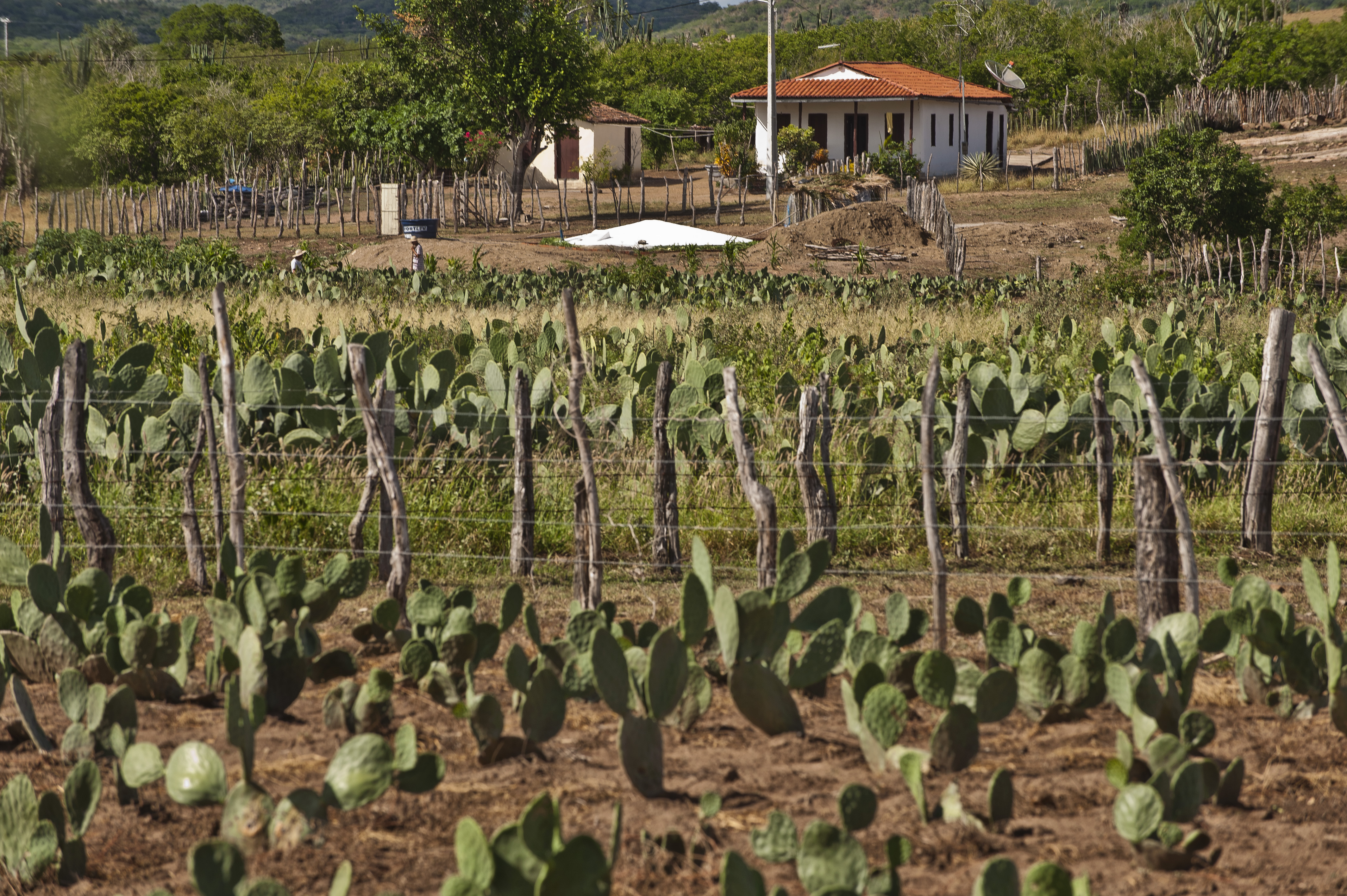 Serra Preta-BA, 14/04/2014. Cultivo de palma, alimento para o gado, no semiárido próximo a uma cisterna de produção. Foto: Sergio Amaral